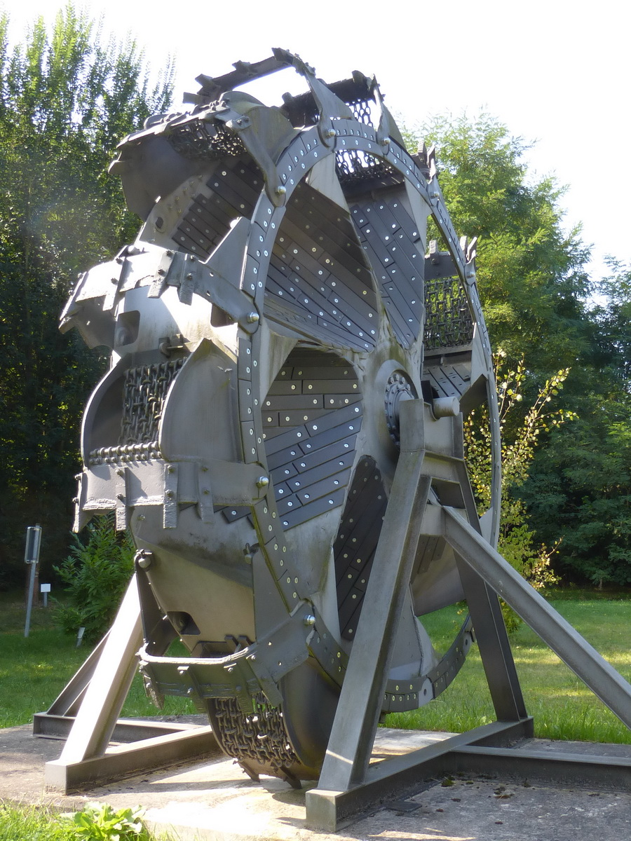 Schaufelrad eines Braunkohlebaggers, ausgestellt im so genannten Tertiärwald in Wackersdorf (Oberpfalz)